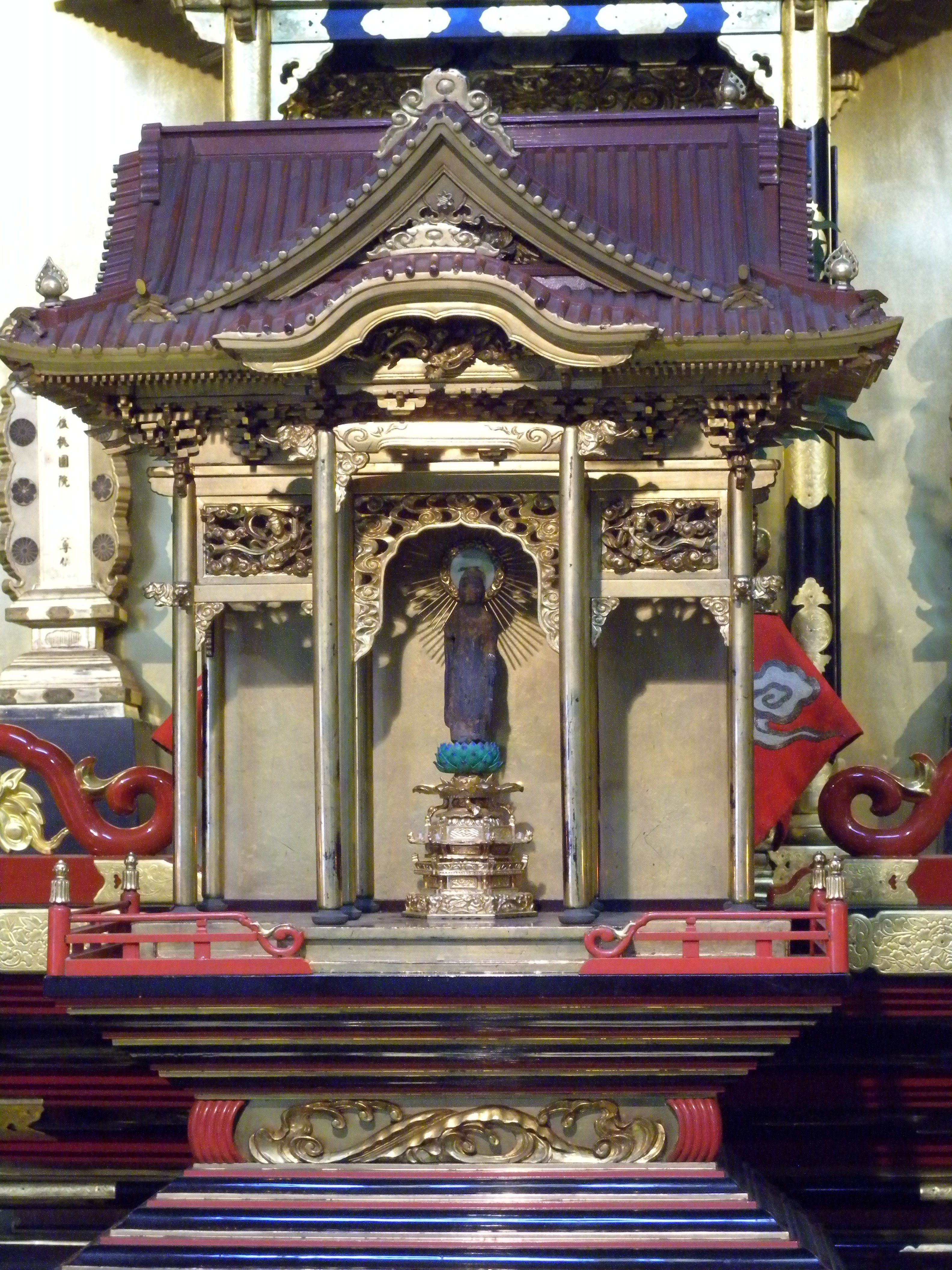 蓮如上人から下賜された阿弥陀如来像